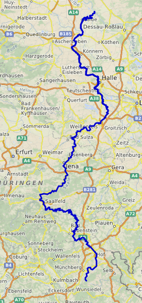 carte réalisée sur umap This map may be incomplete, and may contain errors. Don't rely solely on it for navigation.